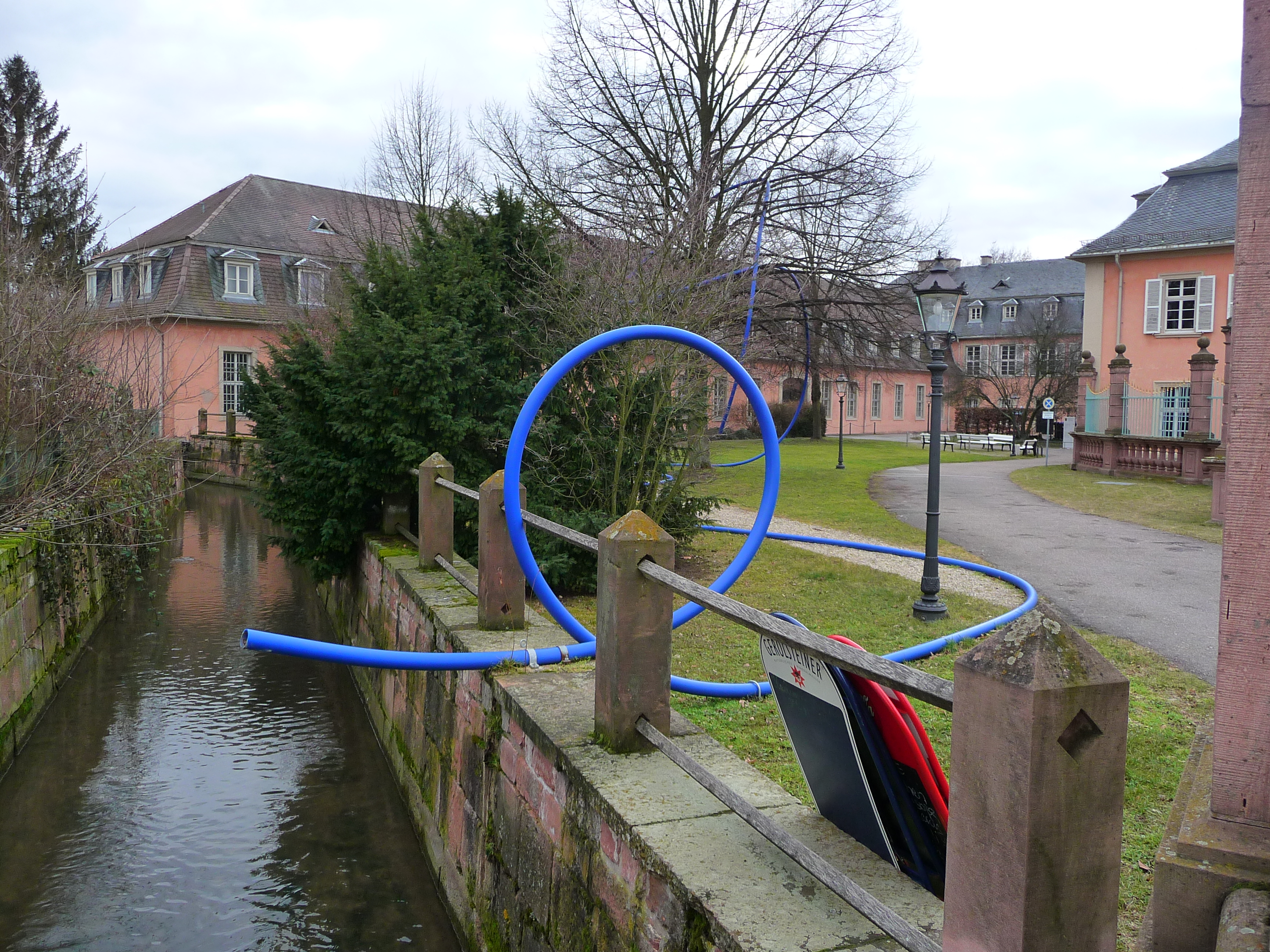 Fachhochschule Schwetzingen, Hochschule für Rechtspflege, untergebracht im linken Teil des Schwetzinger Schlosses